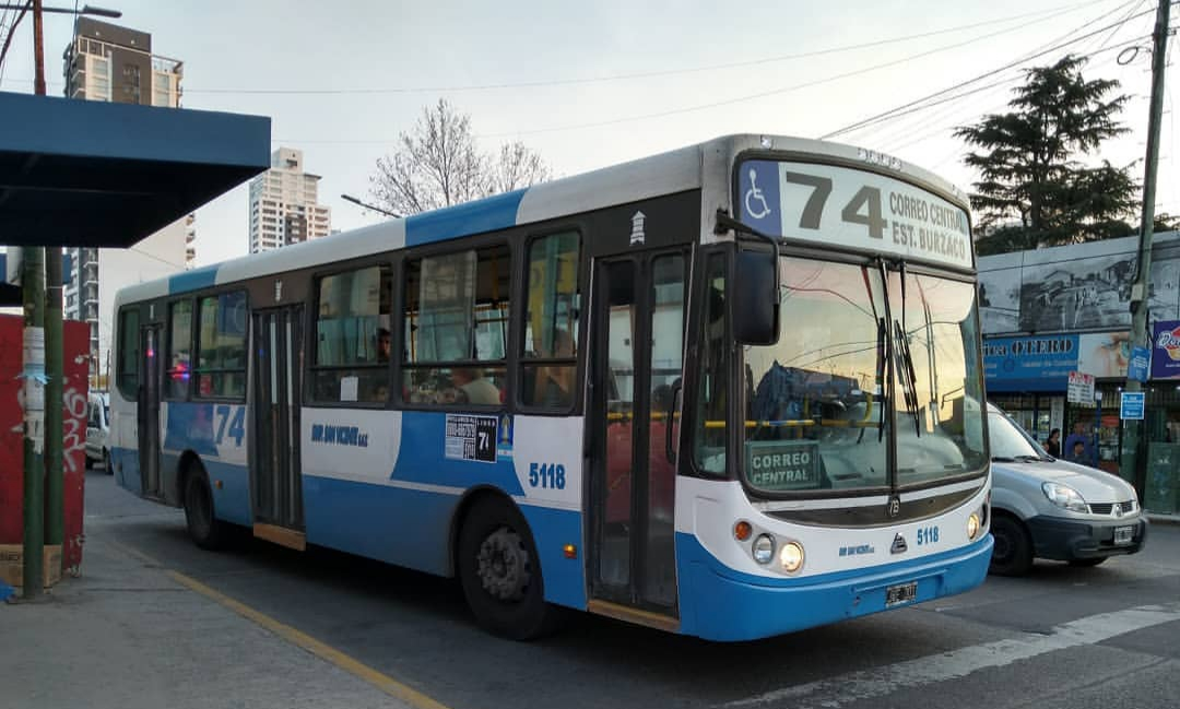 Línea 74